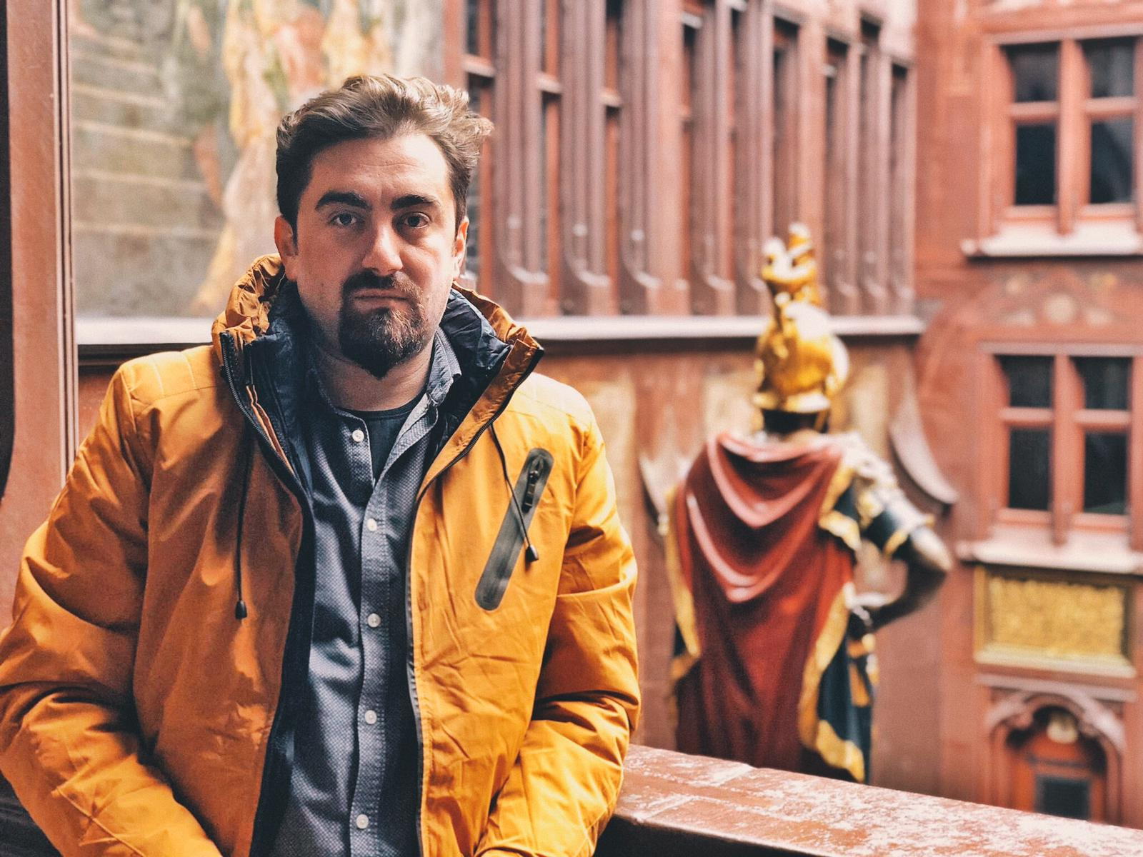 Regjisori Qëndrim Rijani në parlamentin e Zvicrës